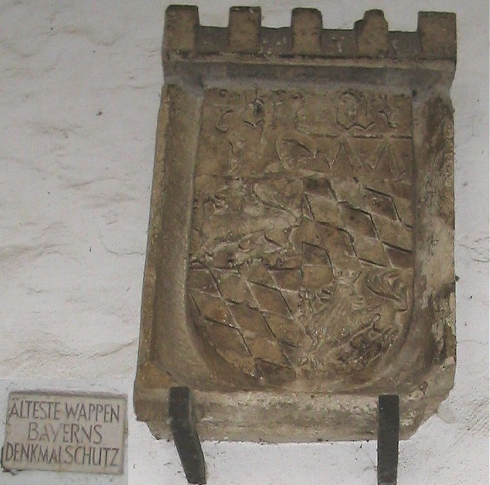 Älteste Darstellung des Bayerischen Wappens im Burgtor der Burg Vohburg